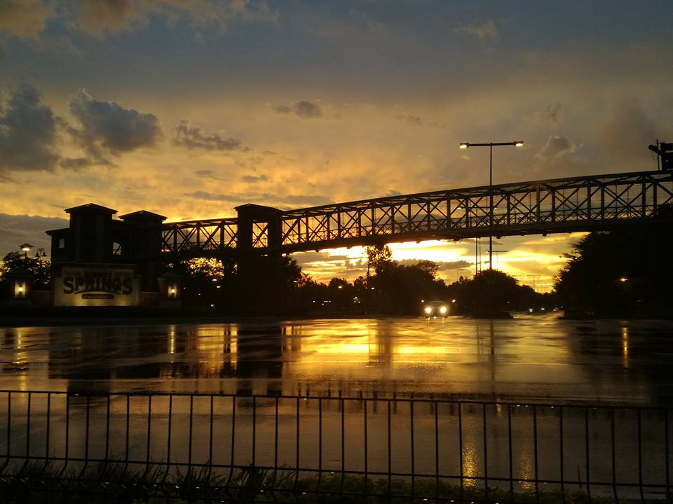 Atardecer en Disney's Spring